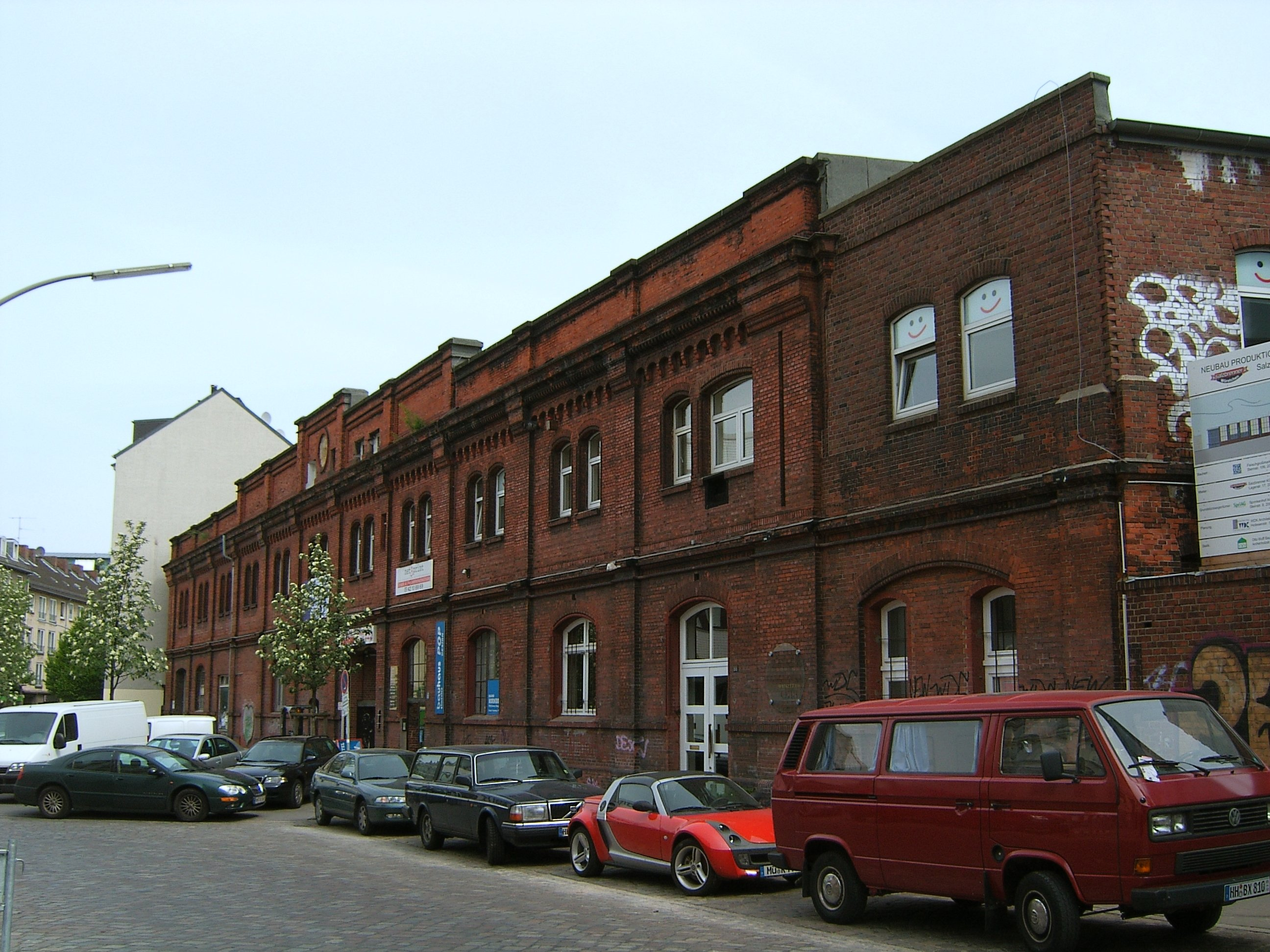 Alter Haupteingang des Schlachthofes (heute Fleischgroßmarkt) auf St. Pauli. Im Gegensatz zum Gebäude gehört die im Vordergrund verlaufende Sternstraße schon zum neuen Stadtteil Sternschanze.